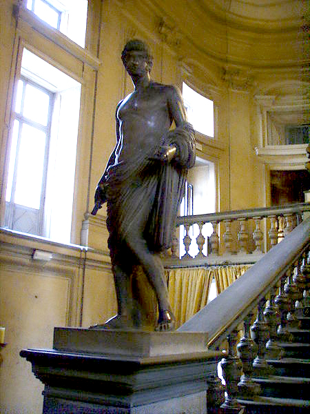 Palazzo corsini, scalone monumentale statua